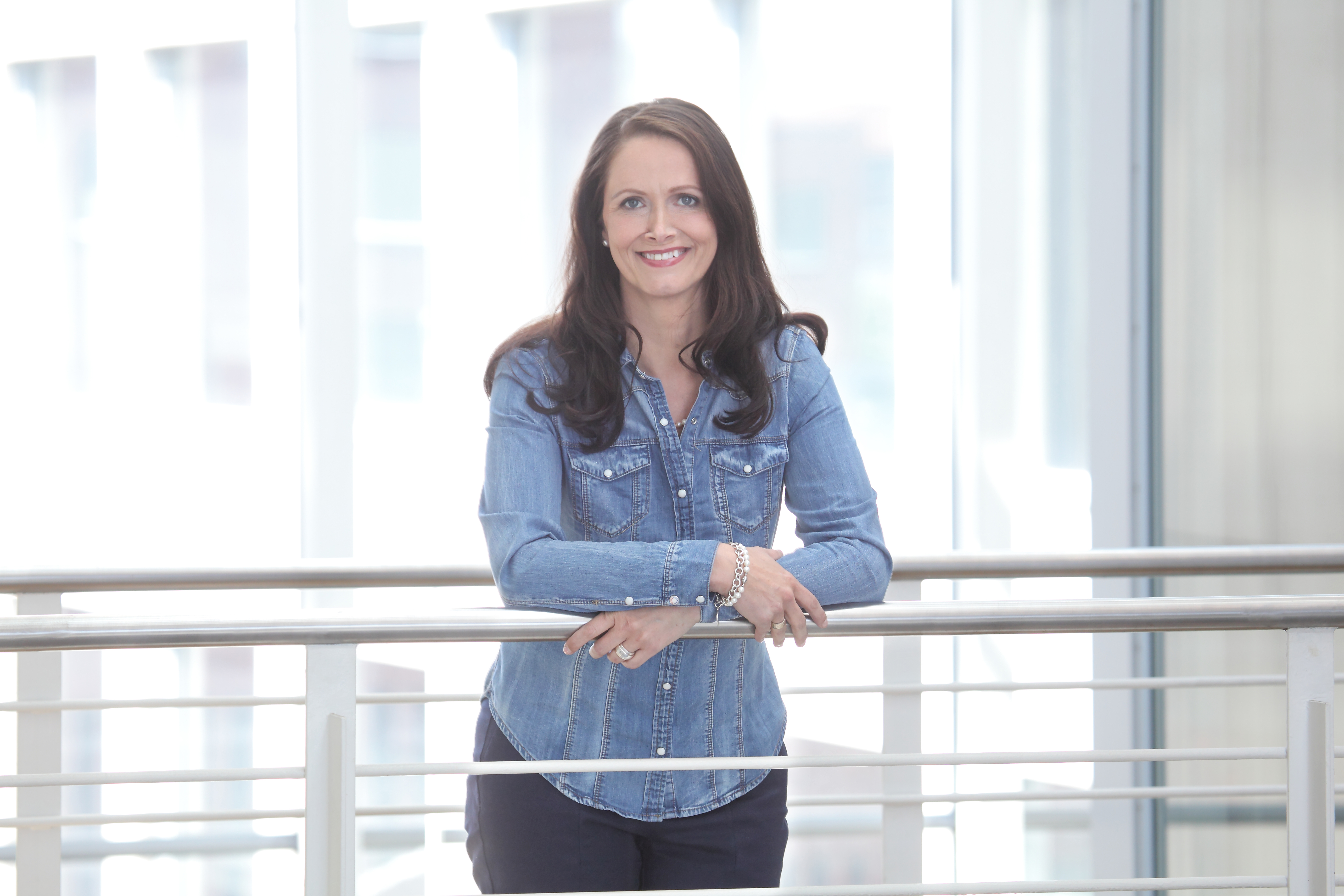 Bürgermeisterin Imke Heymann